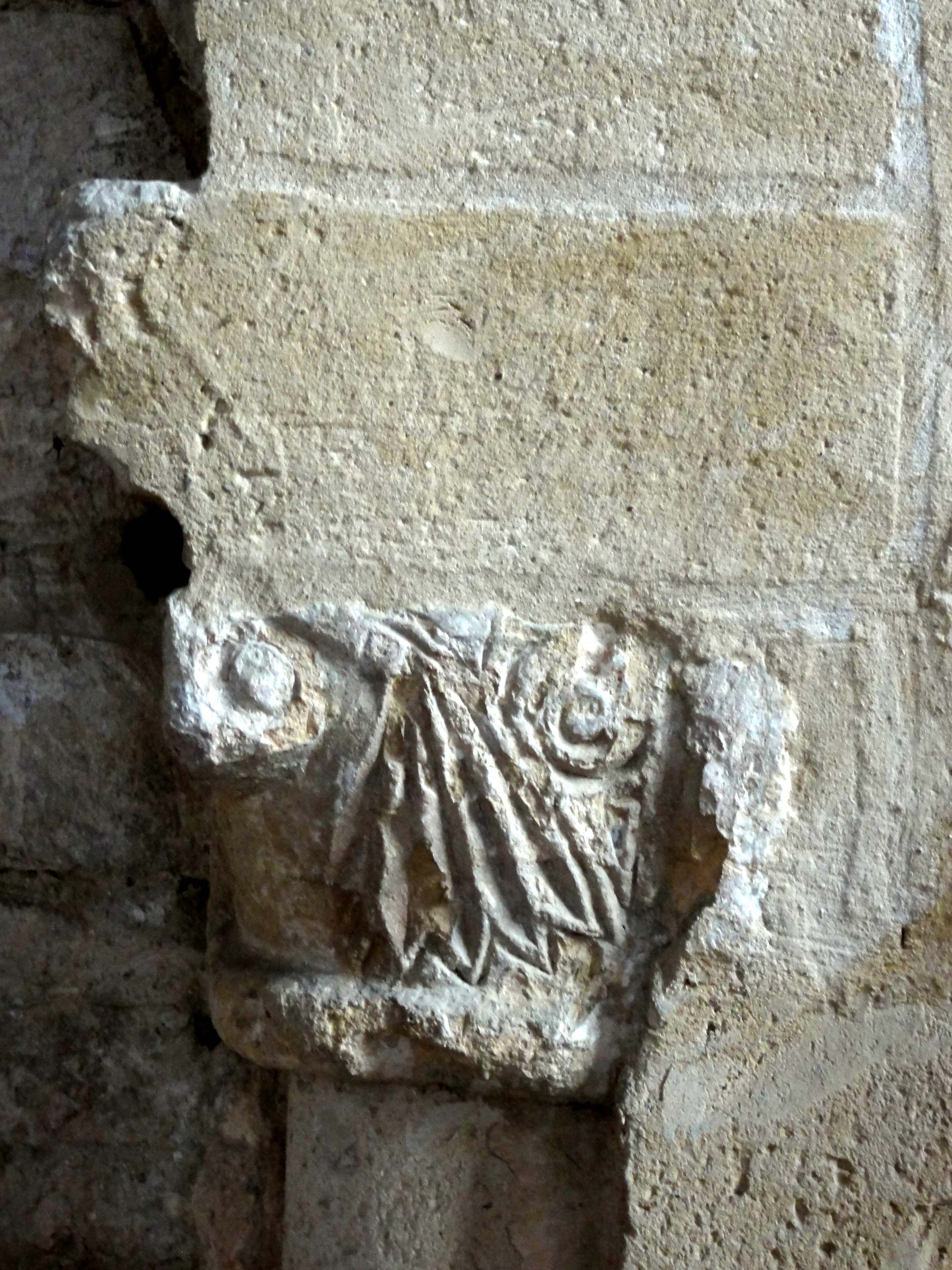 Chœur, arcature plaquée romane sur la base du clocher, chapiteau à droite.